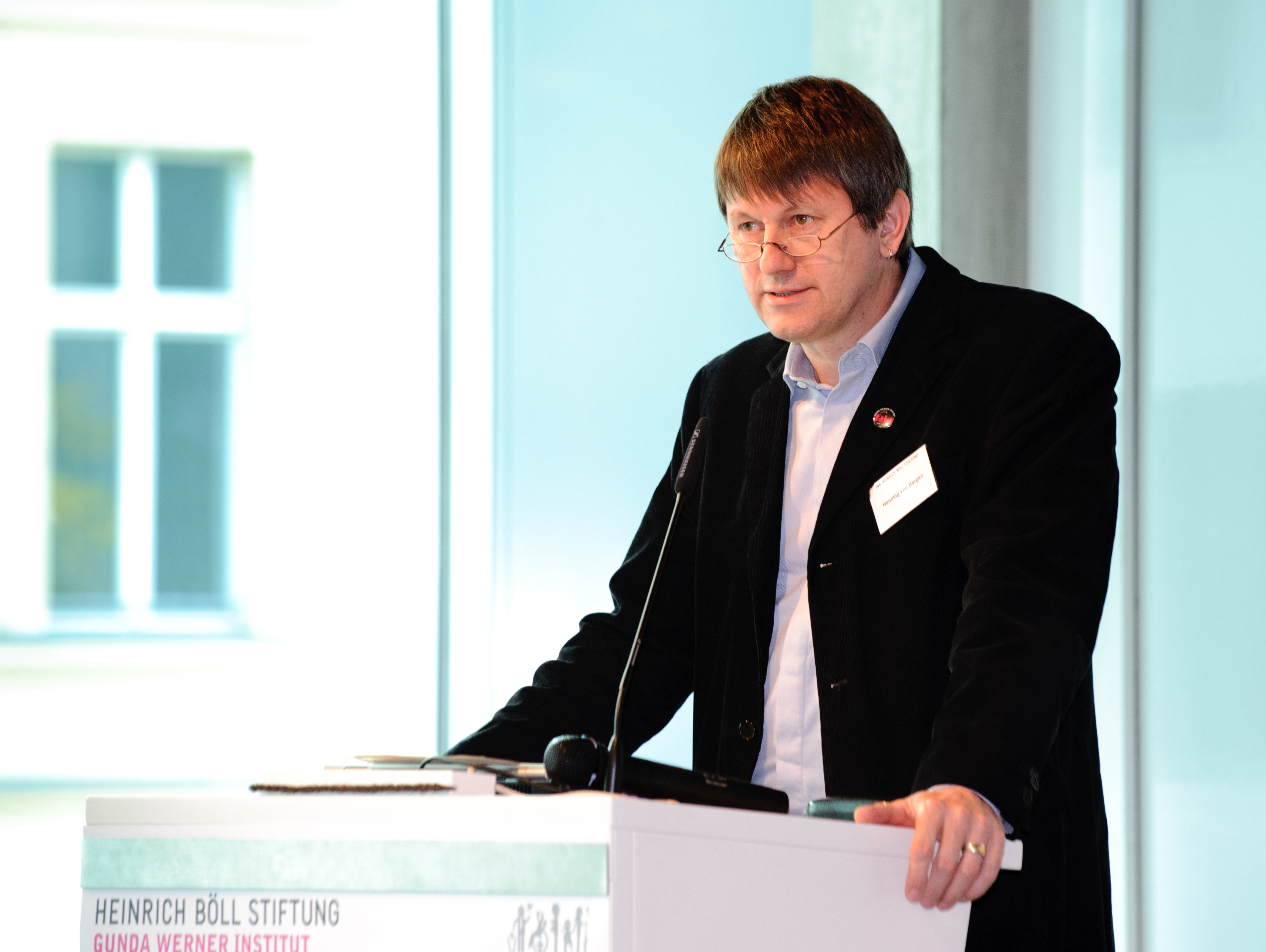 Henning von Bargen